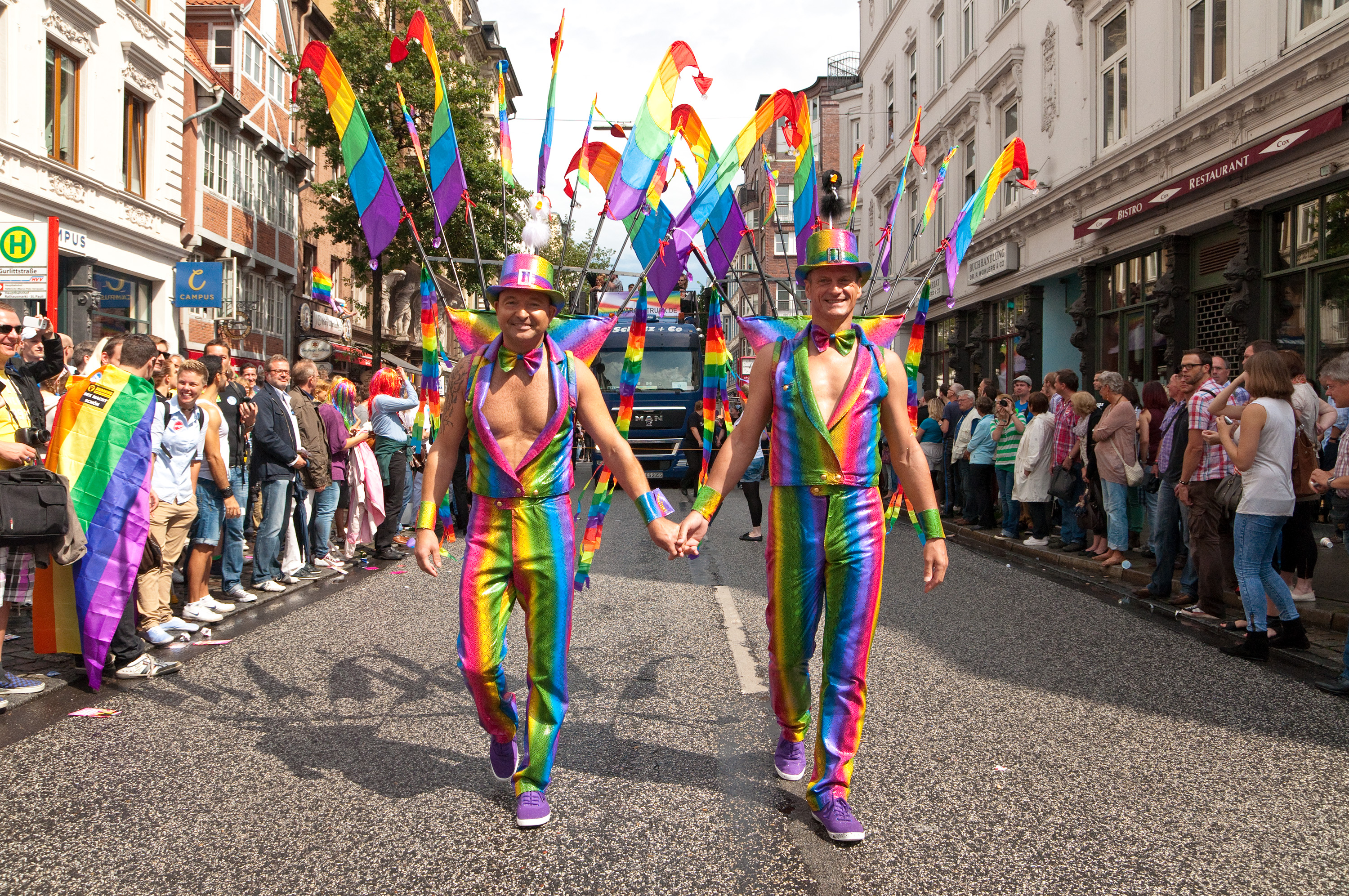 Christopher Street Day in Hamburg 2012